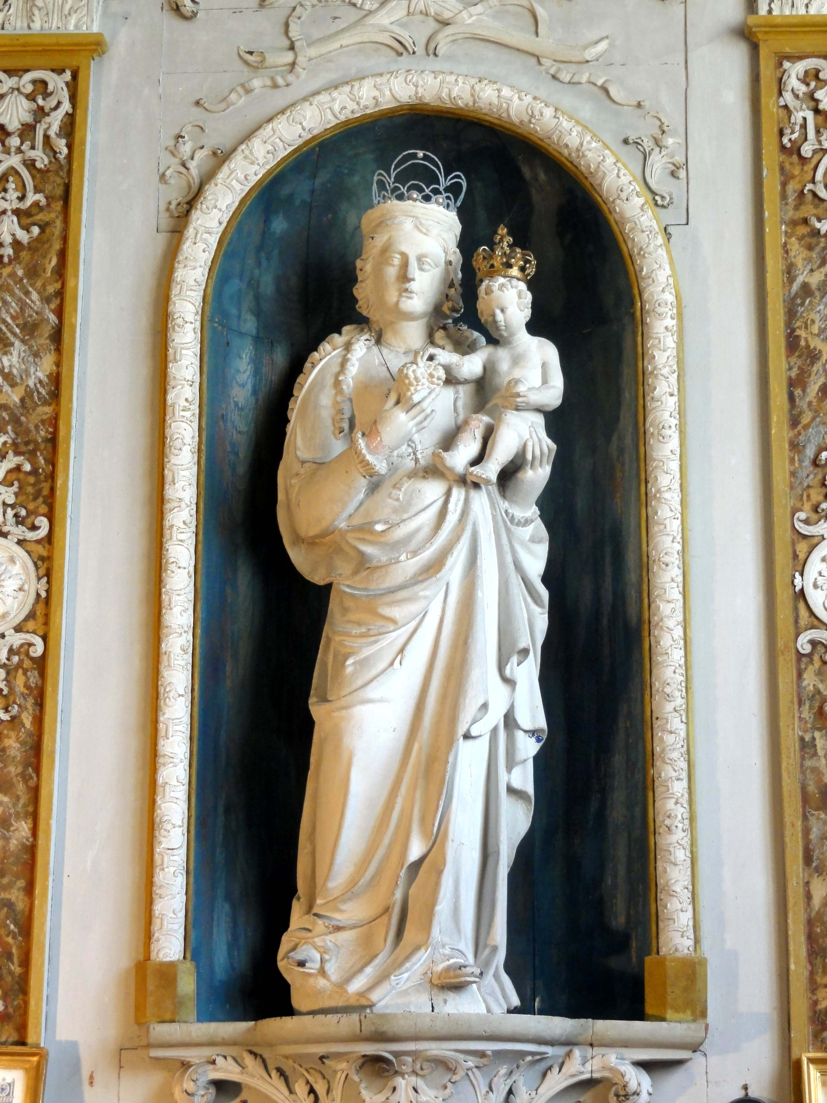 Mobilier de l'église - voir titre.